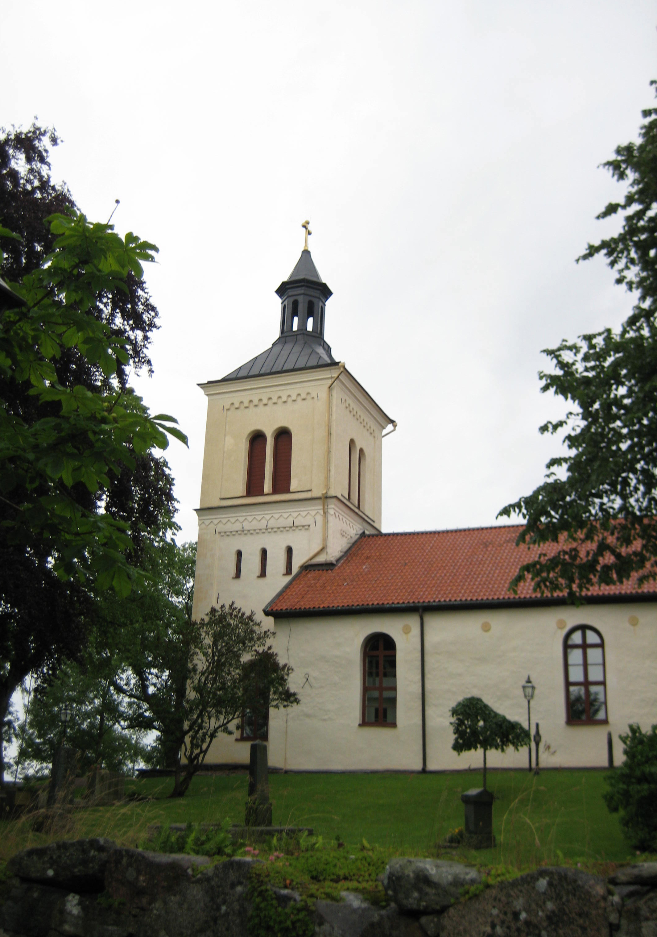 Järstorps kyrka, Jönköping.